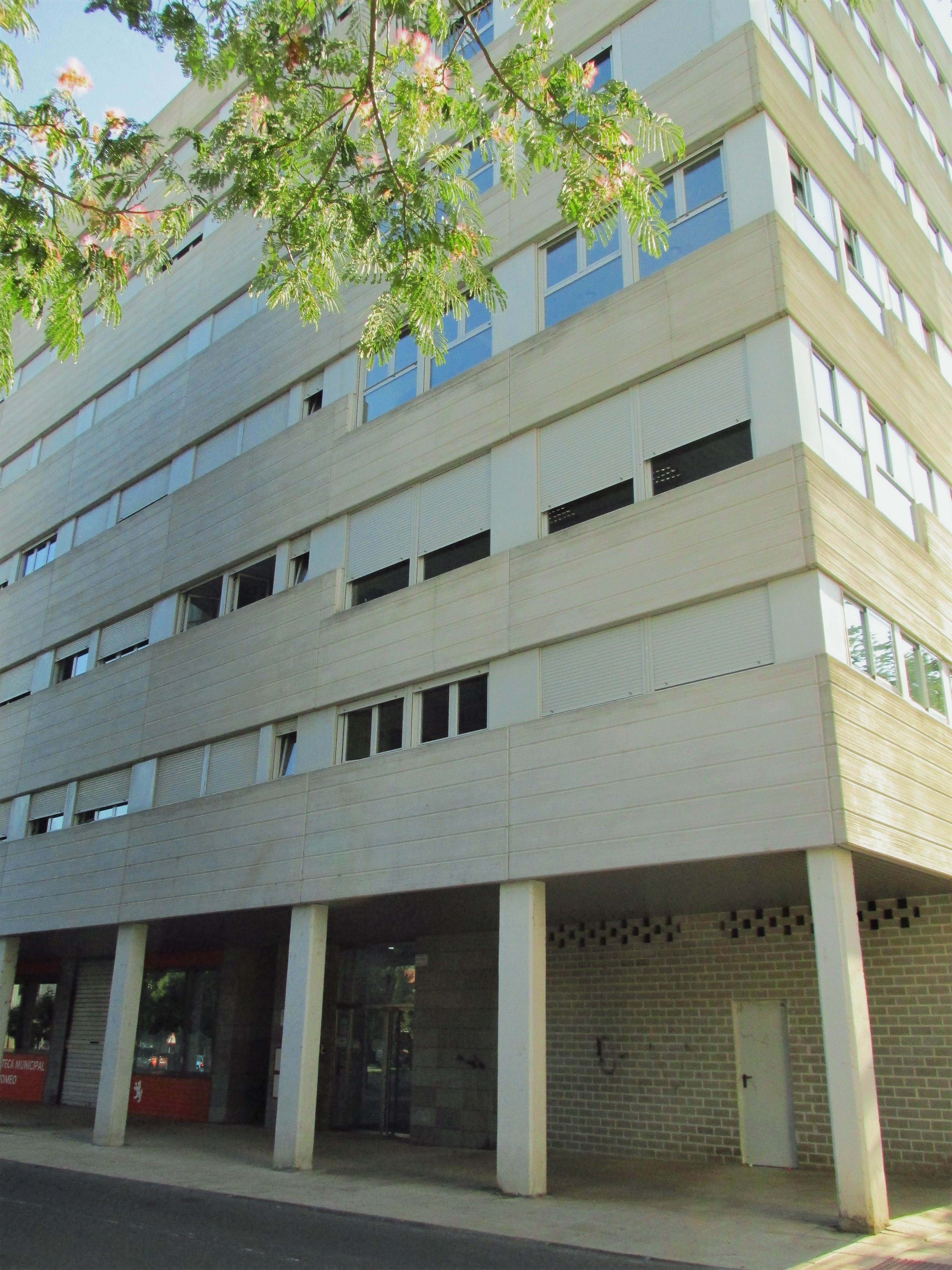 Edificio de la Villa Expo. Zaragoza.